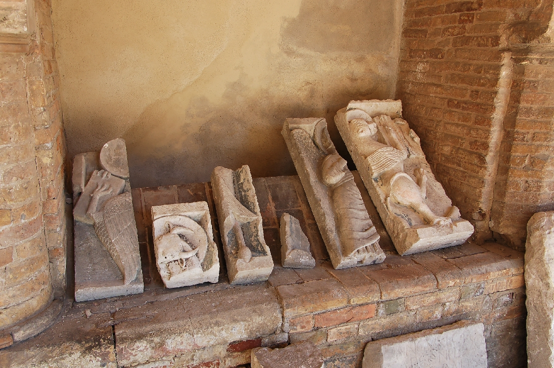 Atri 2011